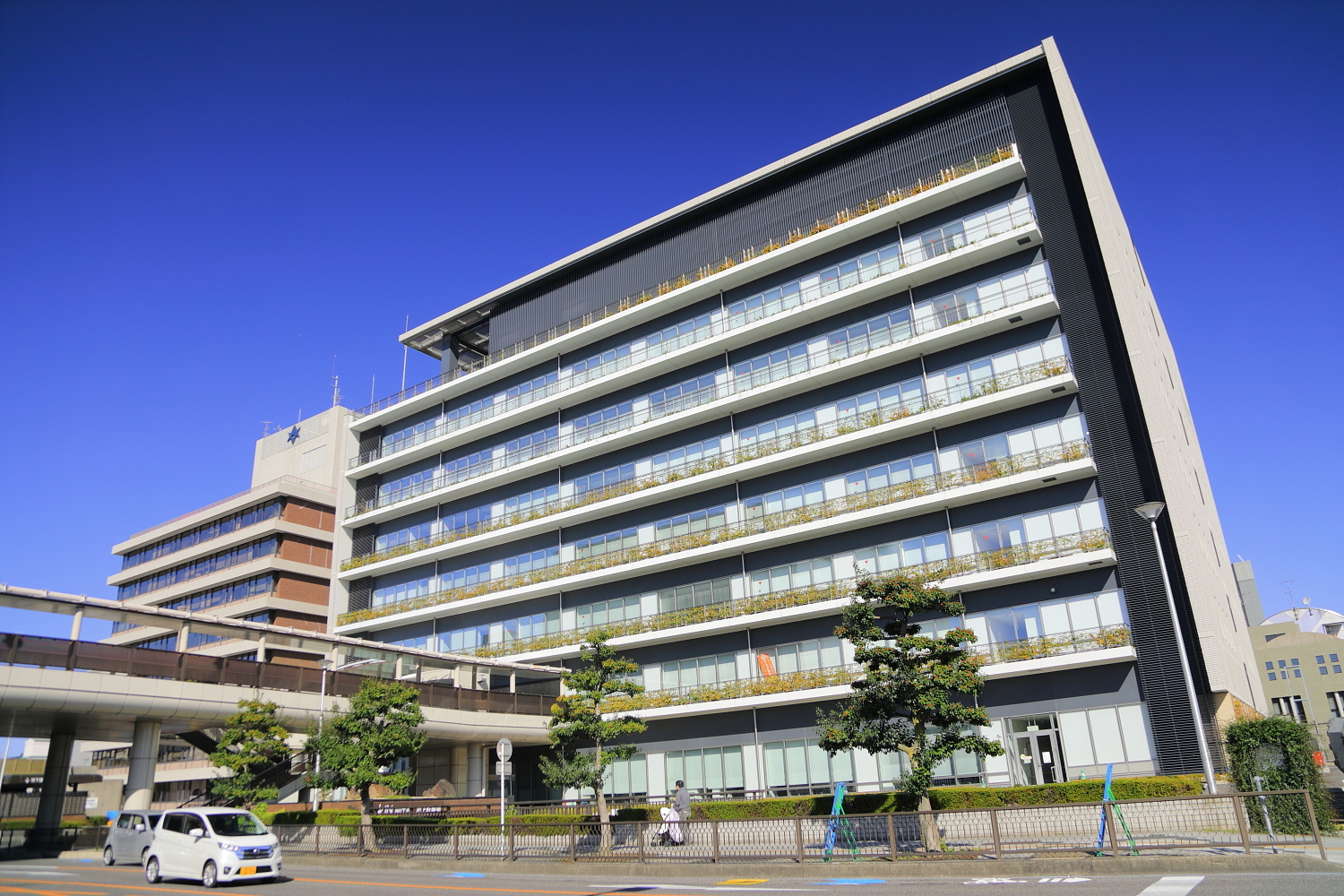 豊田市役所西庁舎（画像奥）及び東庁舎（画像手前）外観（豊田市、2018年（平成30年）10月）